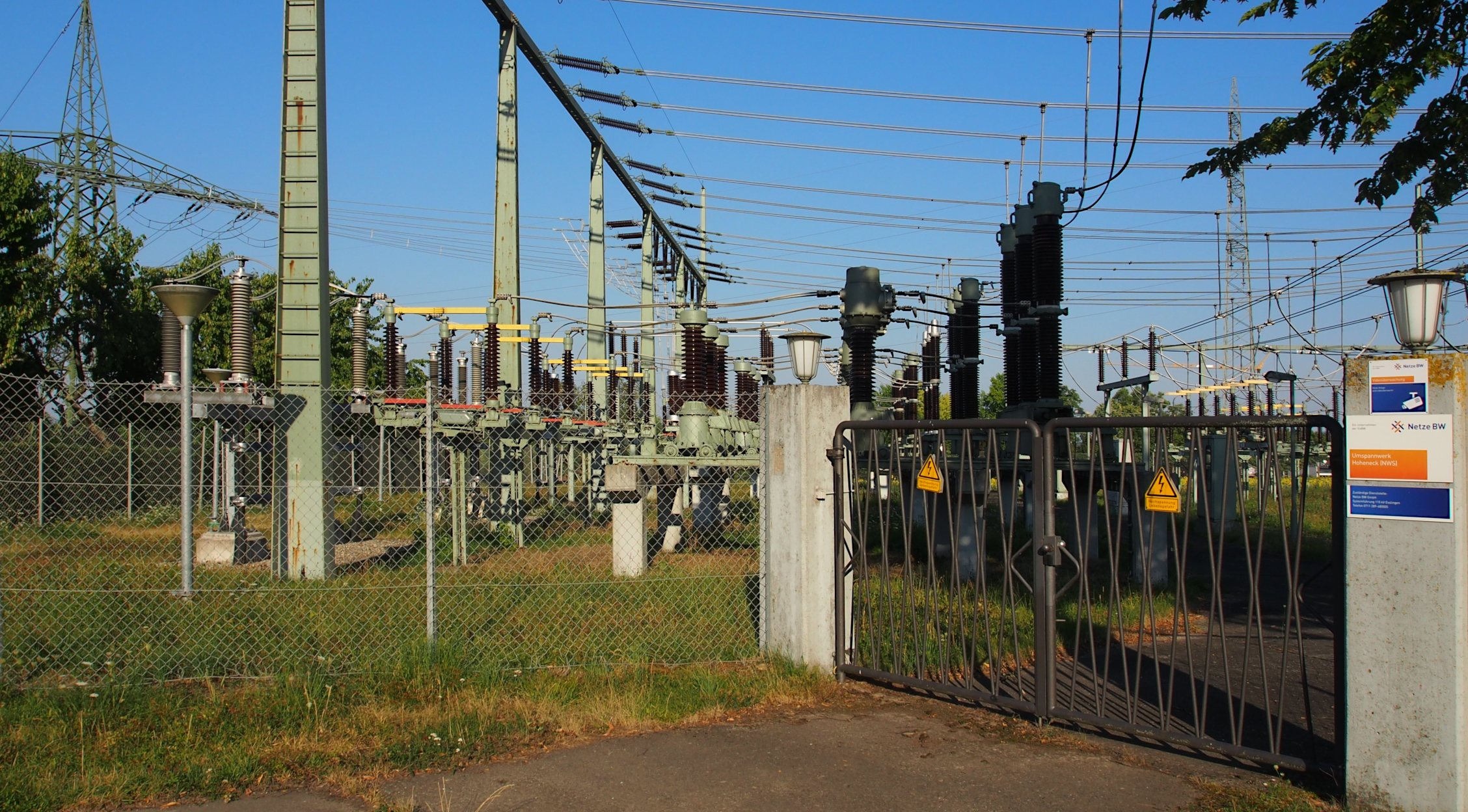 (NWS), Tor an der nordöstlichen 110kV-Anlage